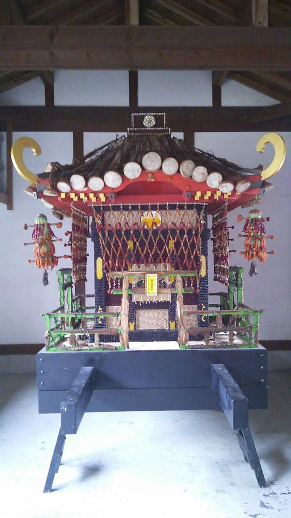 棚倉孫神社の瑞饋神輿